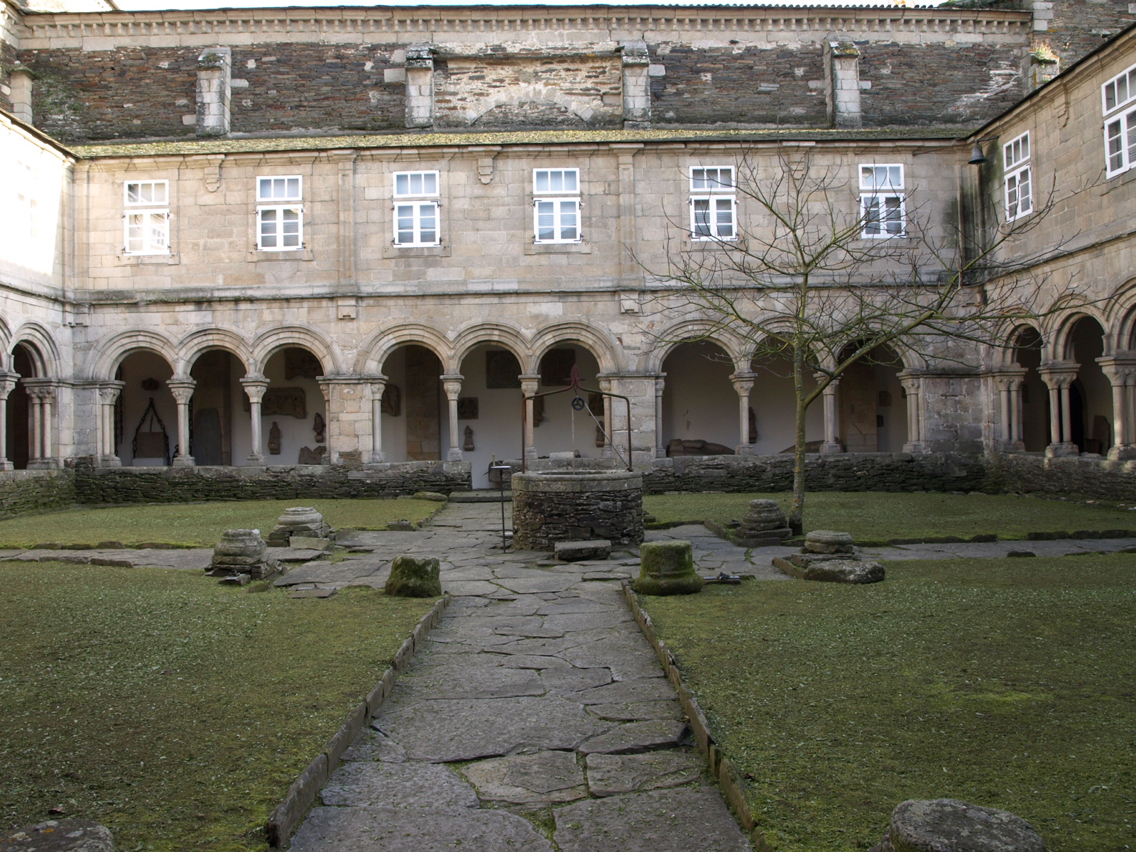 Claustro interior del Museo Provincial de Lugo.